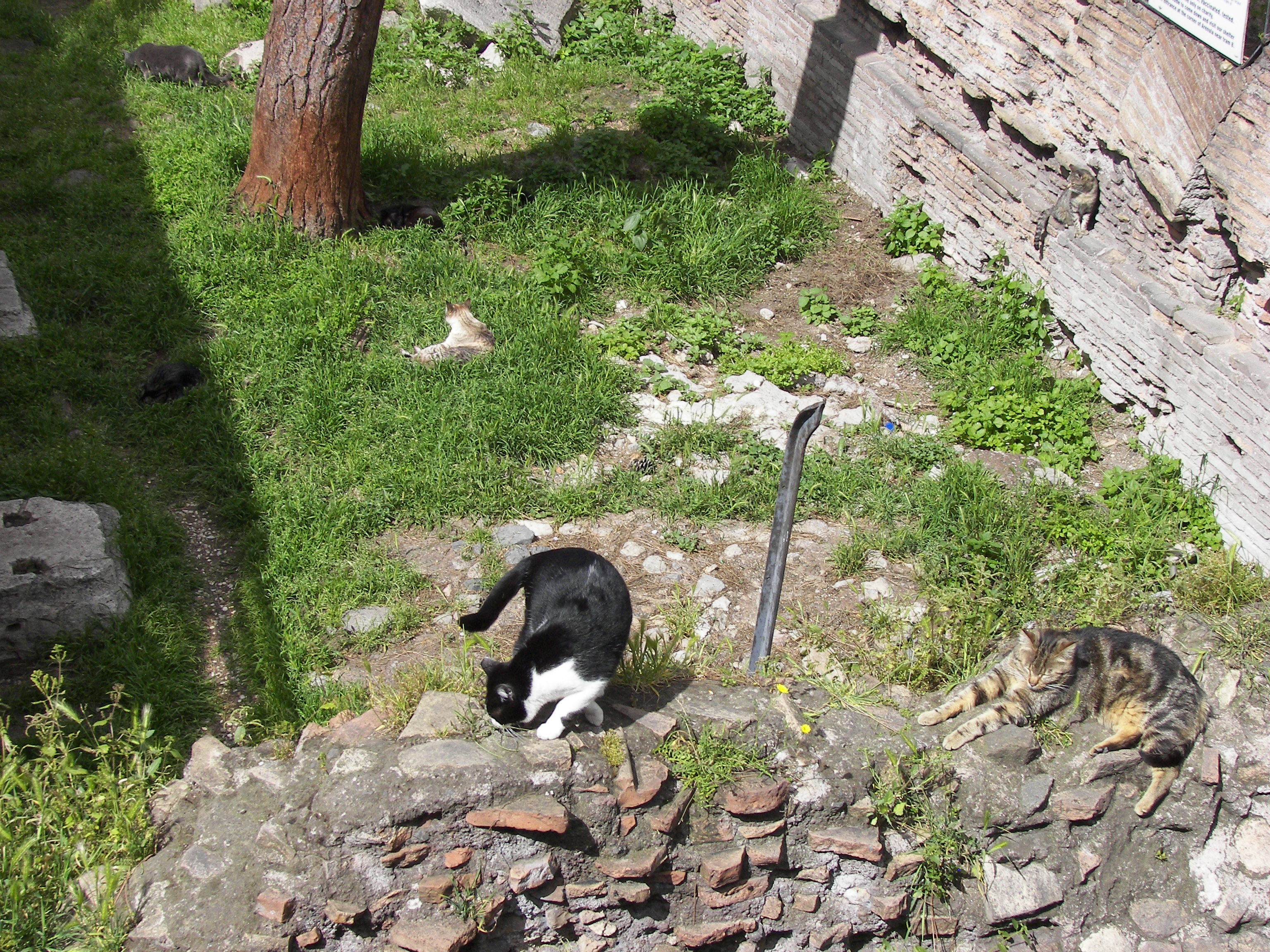 Cats in Largo di Torre Argentina in Rome.